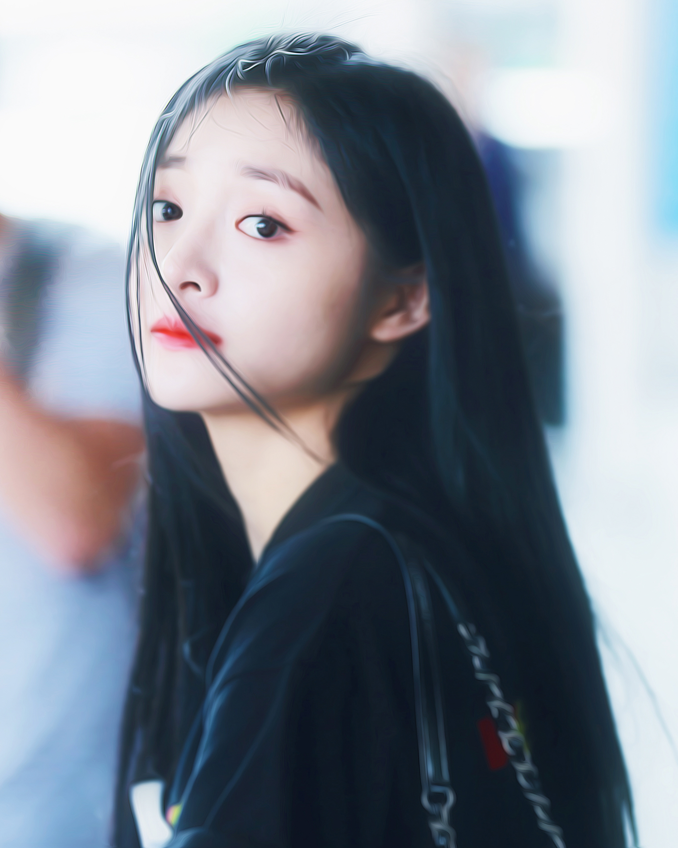 180526 주결경 인천 도착